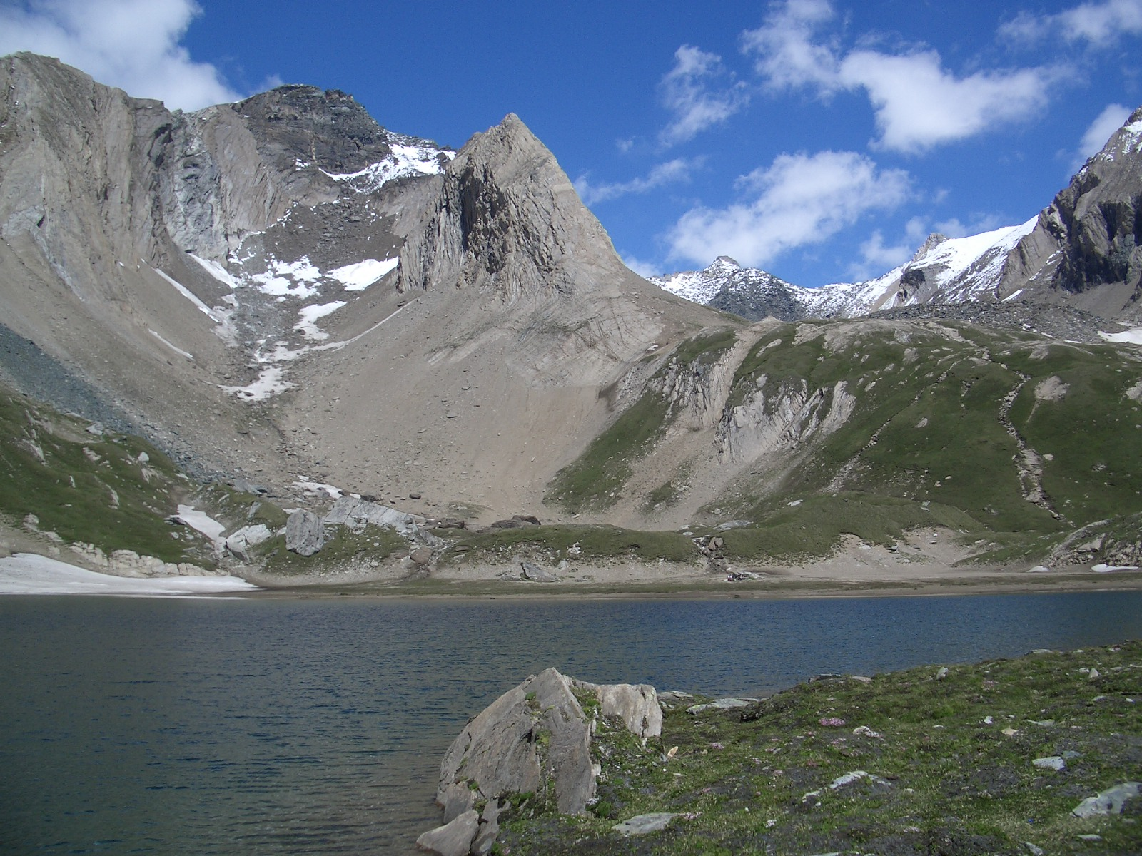 Alpenkönigroute, einsamer Bergsee auf der Westseite von Quirl und Ogassilspitze.